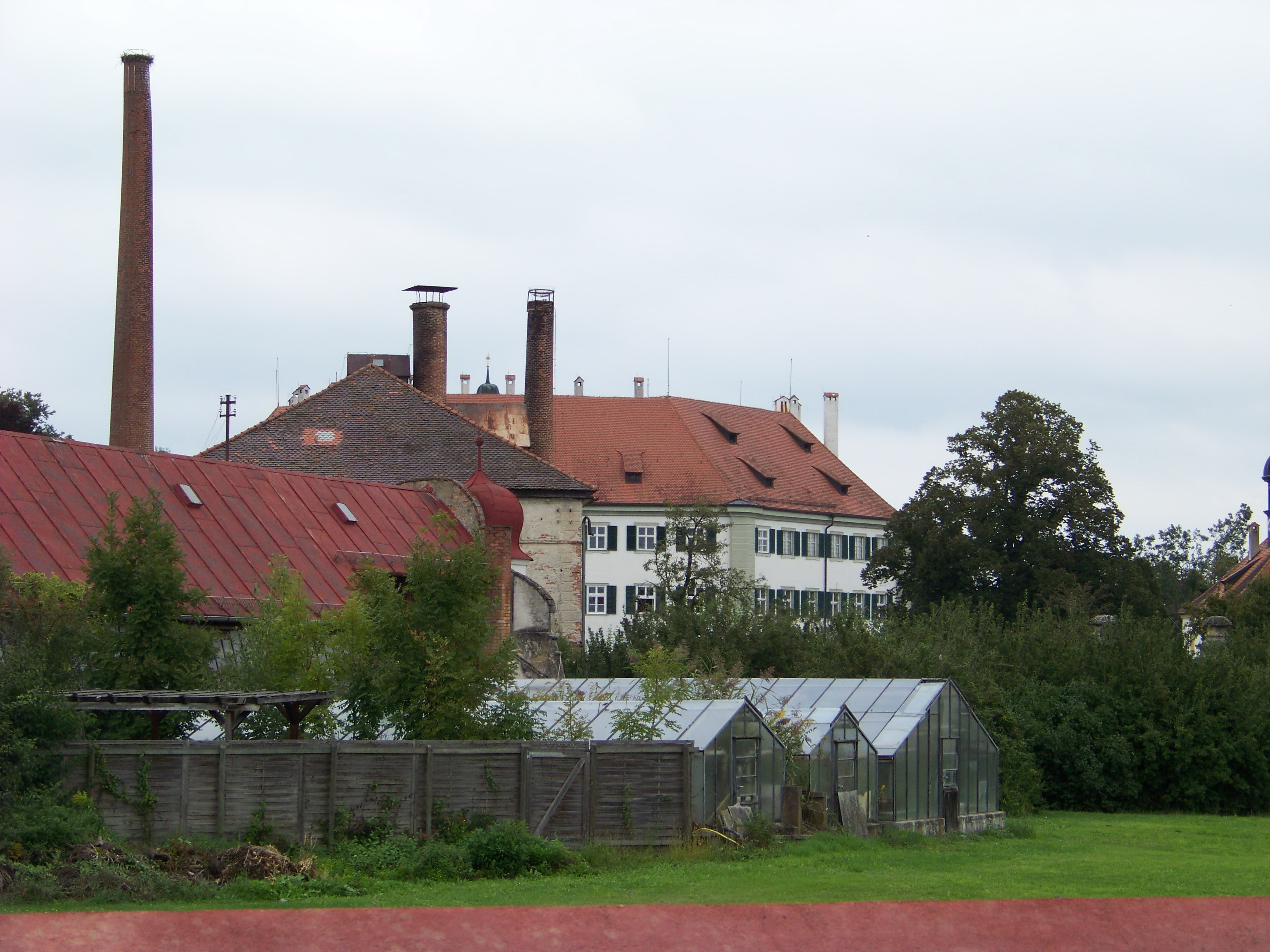 Sünching, Schlossgärtnerei.